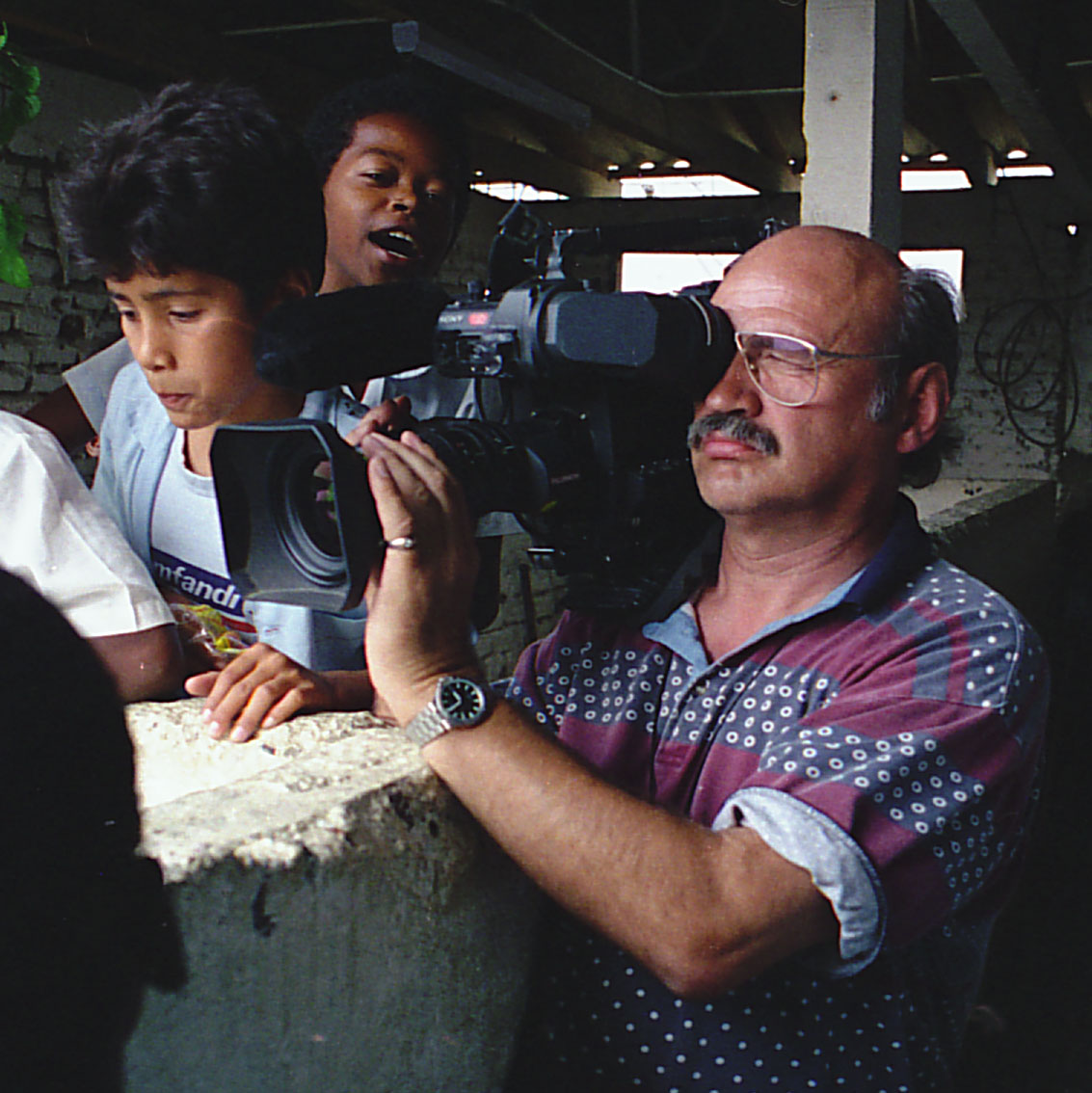 ZDF Kameramann Arno Scheffler in Cali, Kolumbien, bei Dreharbeiten für den Film "Warum riskiert Alfred Welker sein Leben in Agua Blanca?" (1995) Für die Kameraarbeit wurde Scheffler mit dem "Telestar" ausgezeichnet